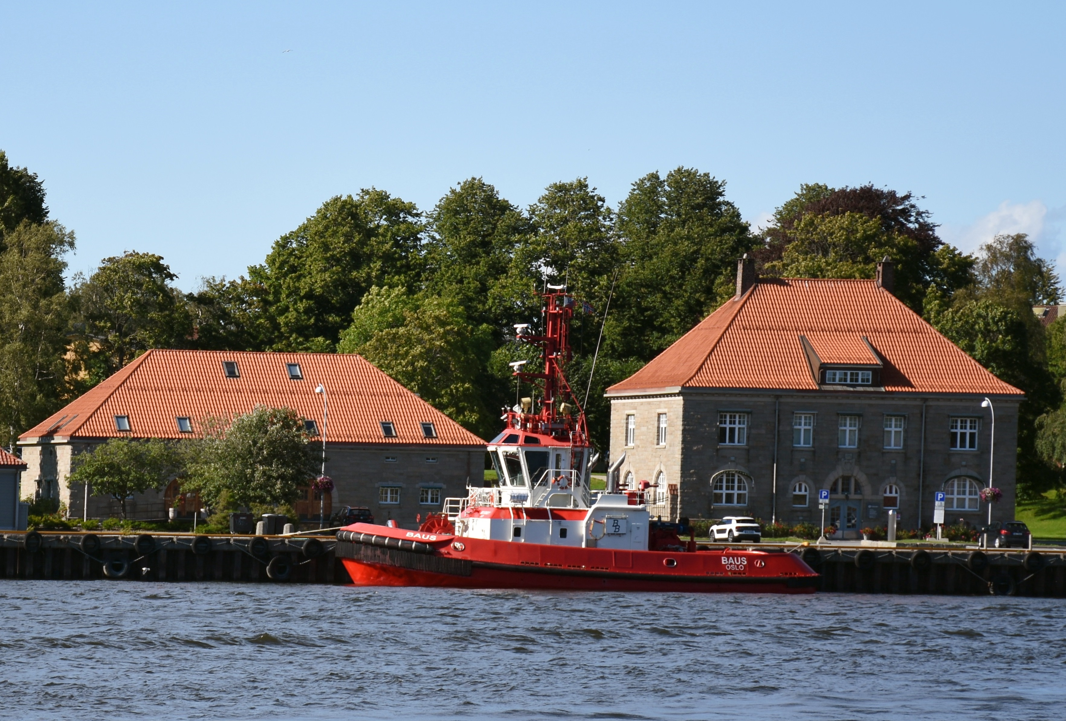 Fredrikstad tollbod (t.h.) med pakkhuset sett fra Gamlebyen